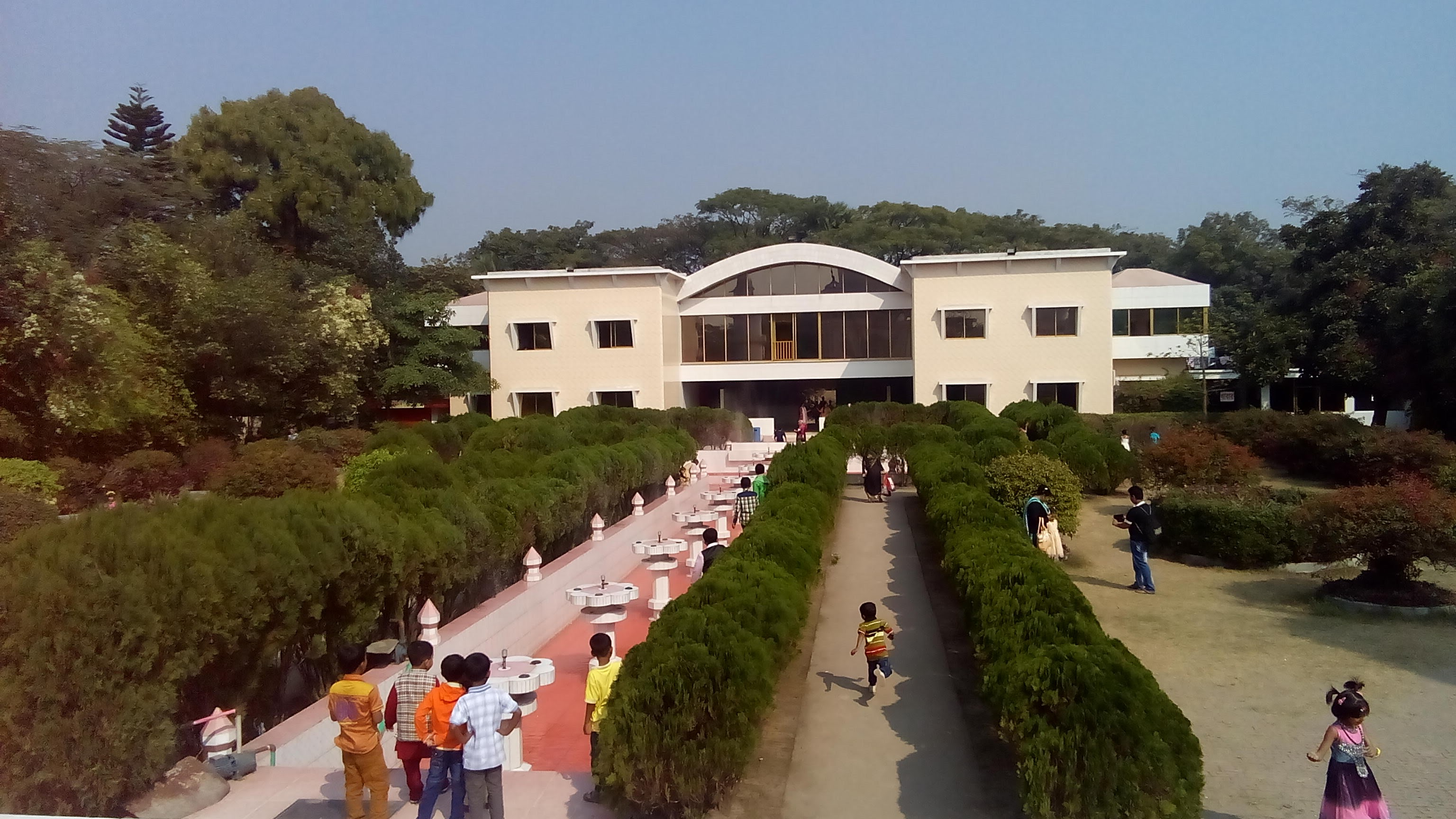 তাজমহল বাংলাদেশ